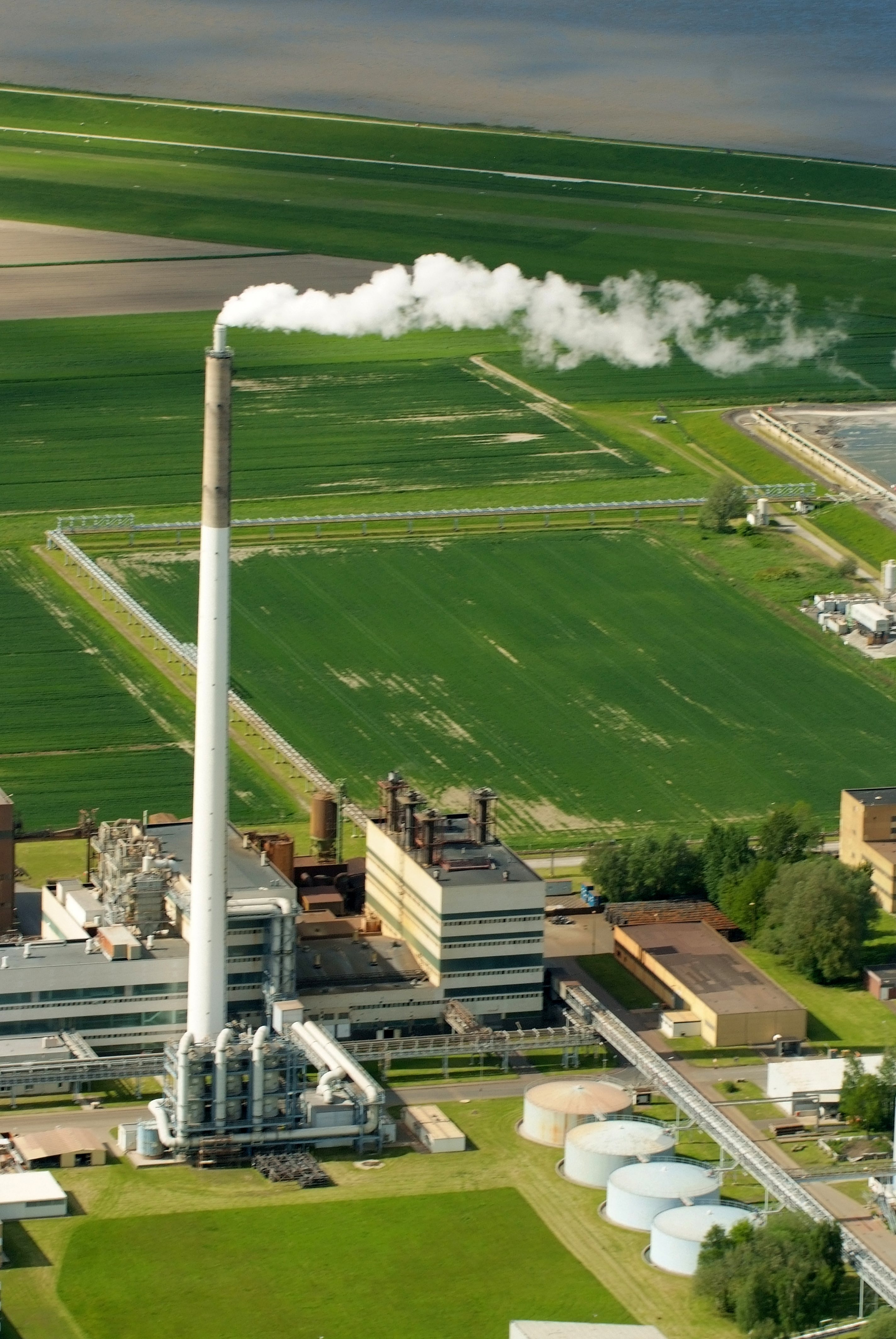 das 1969 gebaute Titanwerk der Kronos-Titan GmbH in Blexen, Stadtteil von Nordenham (Fotoflug vom Flugplatz Nordholz-Spieka über Bremerhaven, Wilhelmshaven und die Ostfriesischen Inseln bis Borkum)